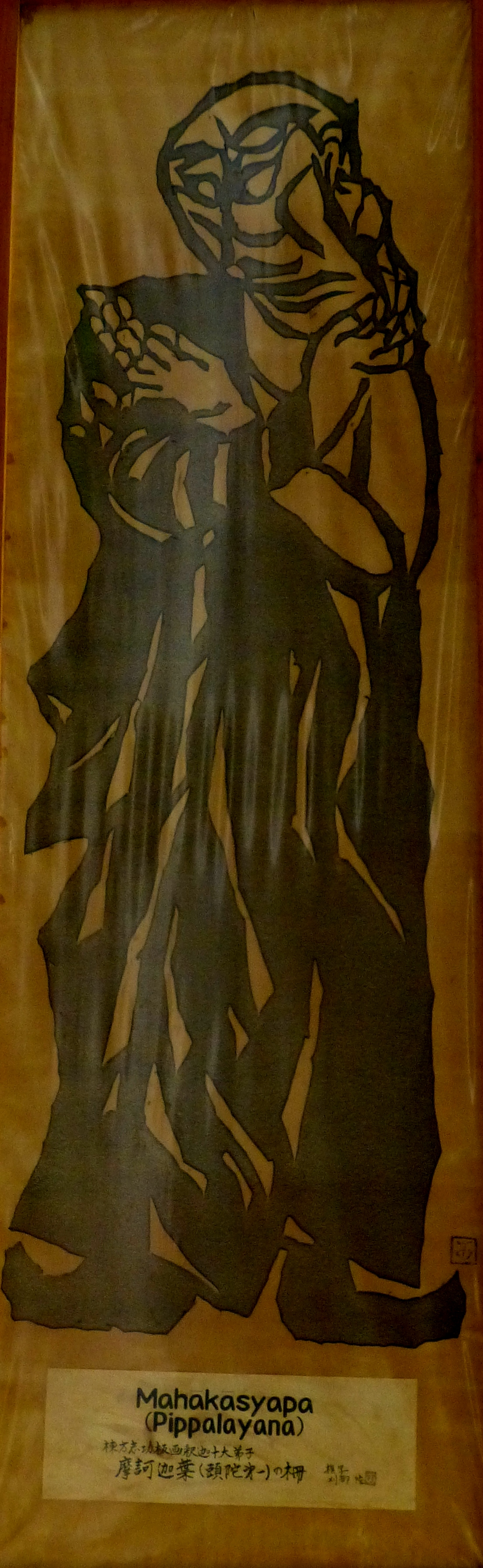 062 Mahakasyapa at Rajgir Photograph from Rajgir in Bihar taken by Anandajoti.